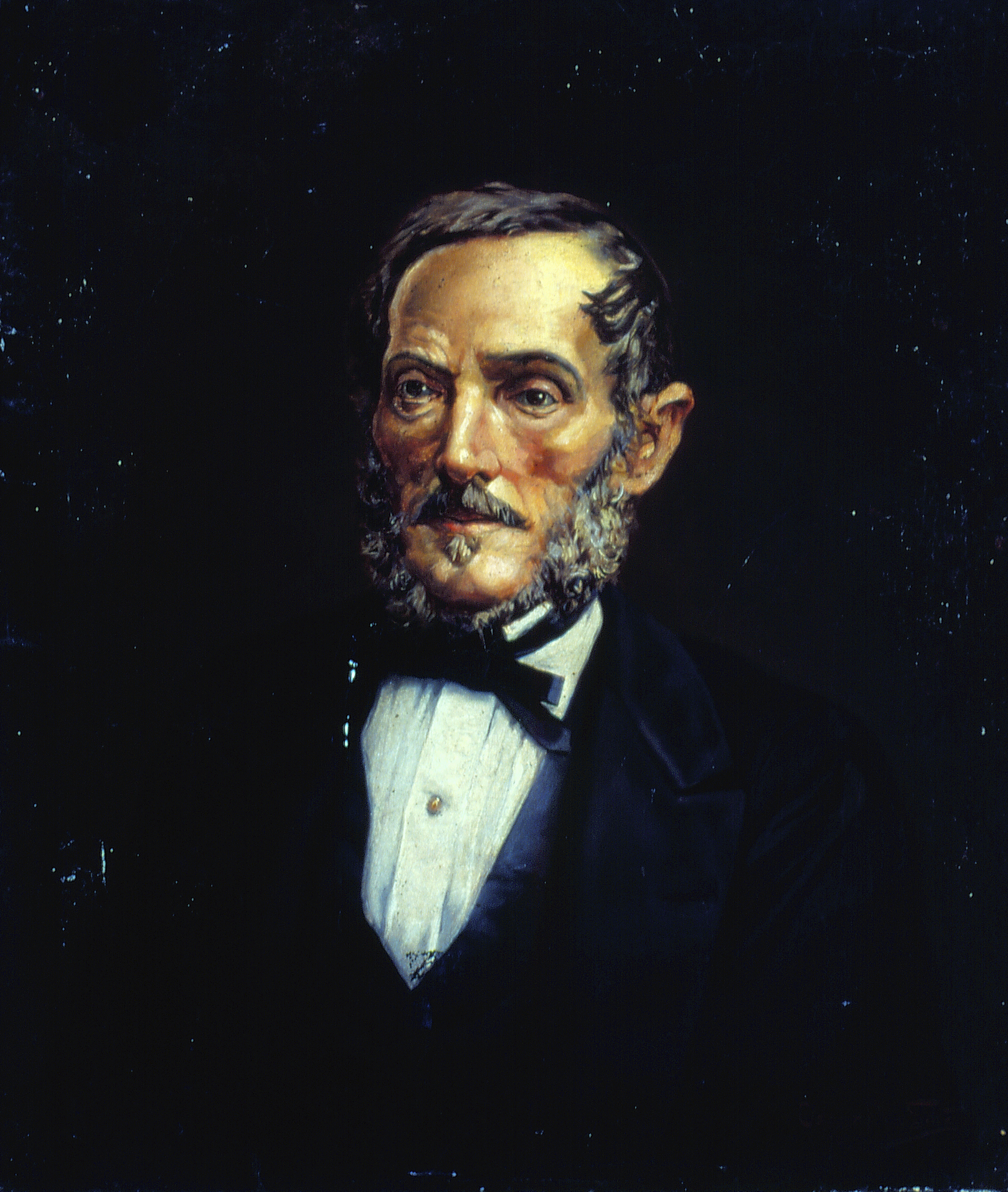 Obra que integra o acervo do Museu Paulista da USP. Coleção Fundo Museu Paulista - FMP